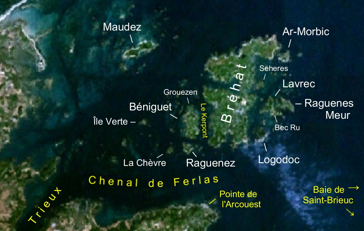 Satellitenbild der Inselgruppe Bréhat. Die Namen der Inseln sind weißgeschrieben, andere Angaben gelb.